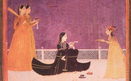 Zeb-un-Nisa Begum